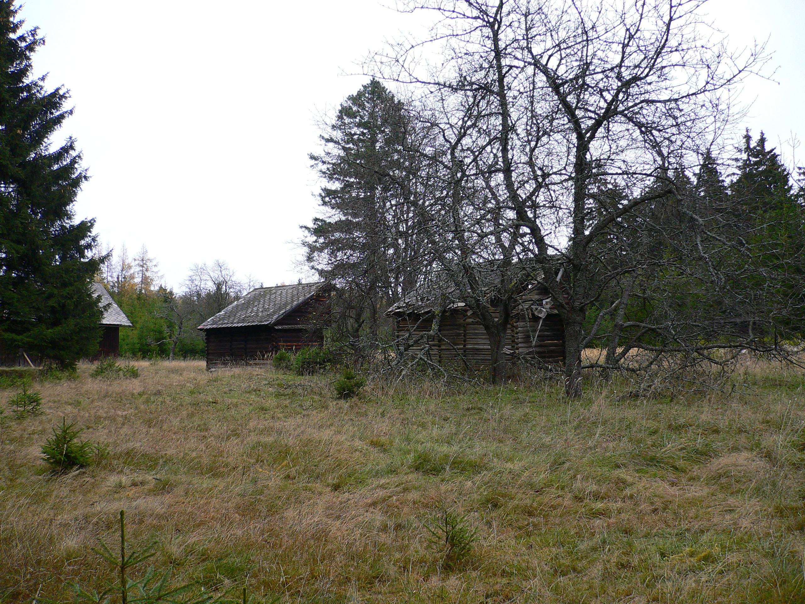 Roubené seníky v místě bývalé myslivny Na Rovinách, Brdy